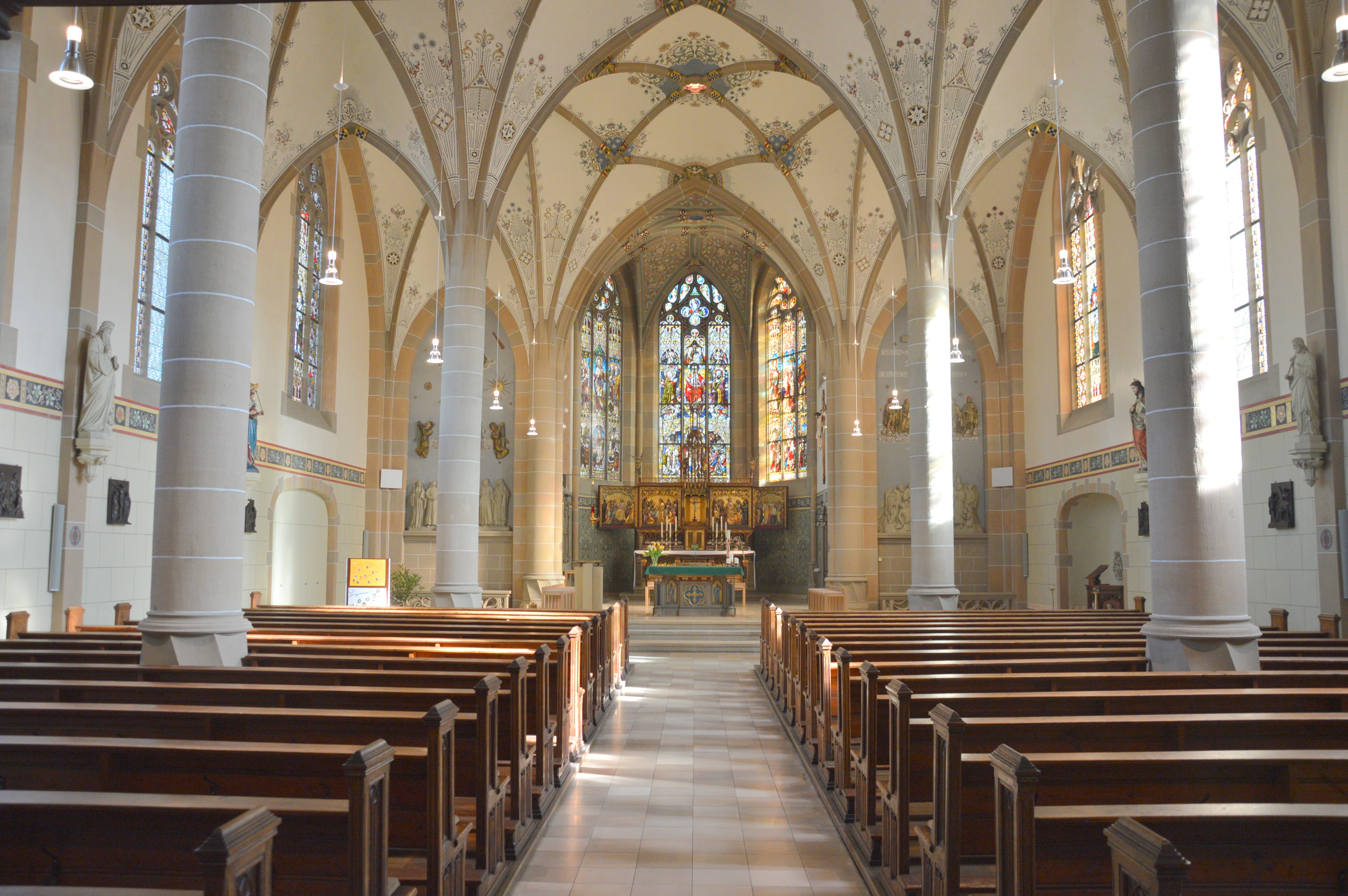 Blick in die katholische Matthäuskirche Bad Sobernheim